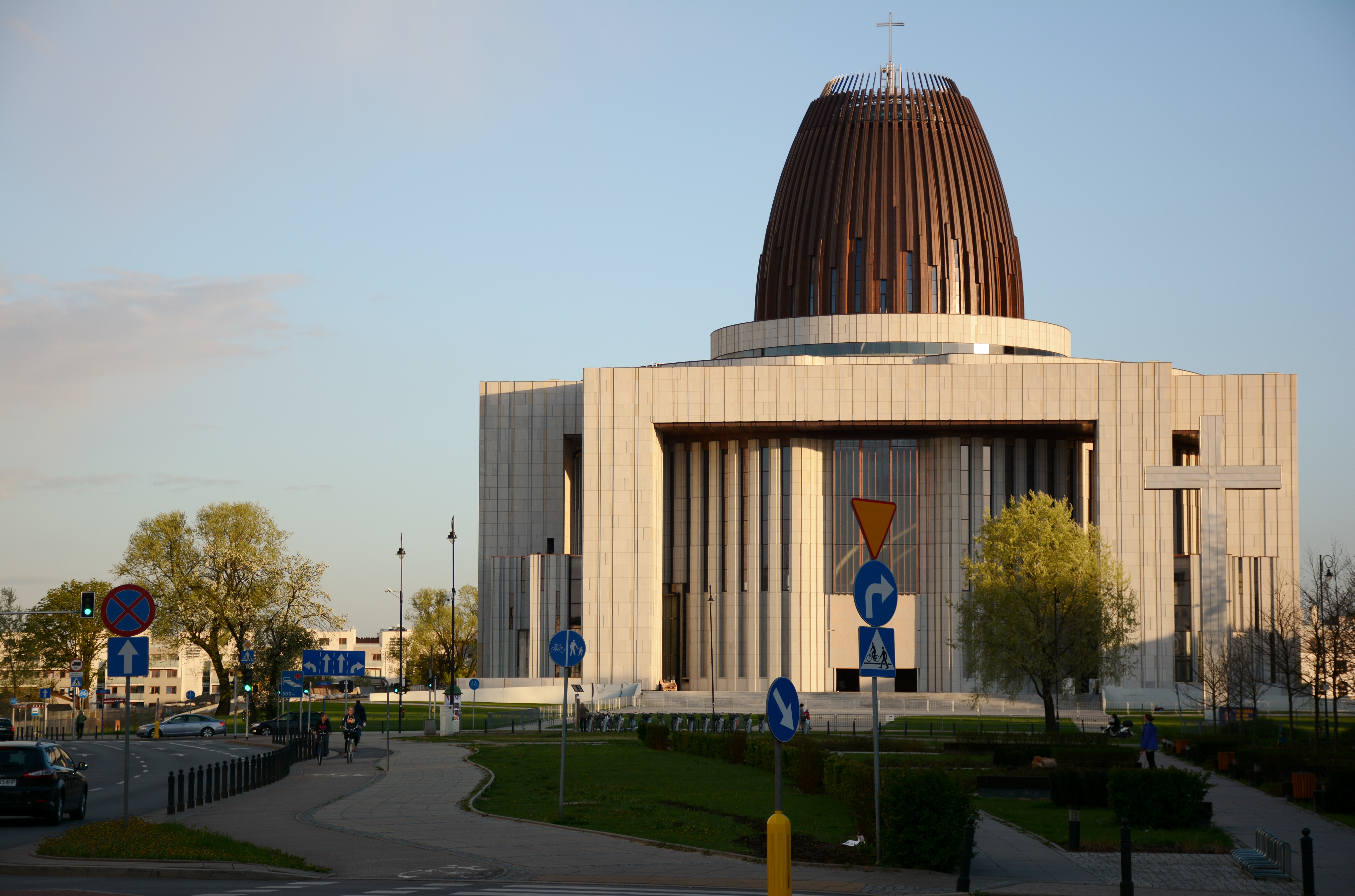 Błonia Wilanowskie, Warszawa, Poland